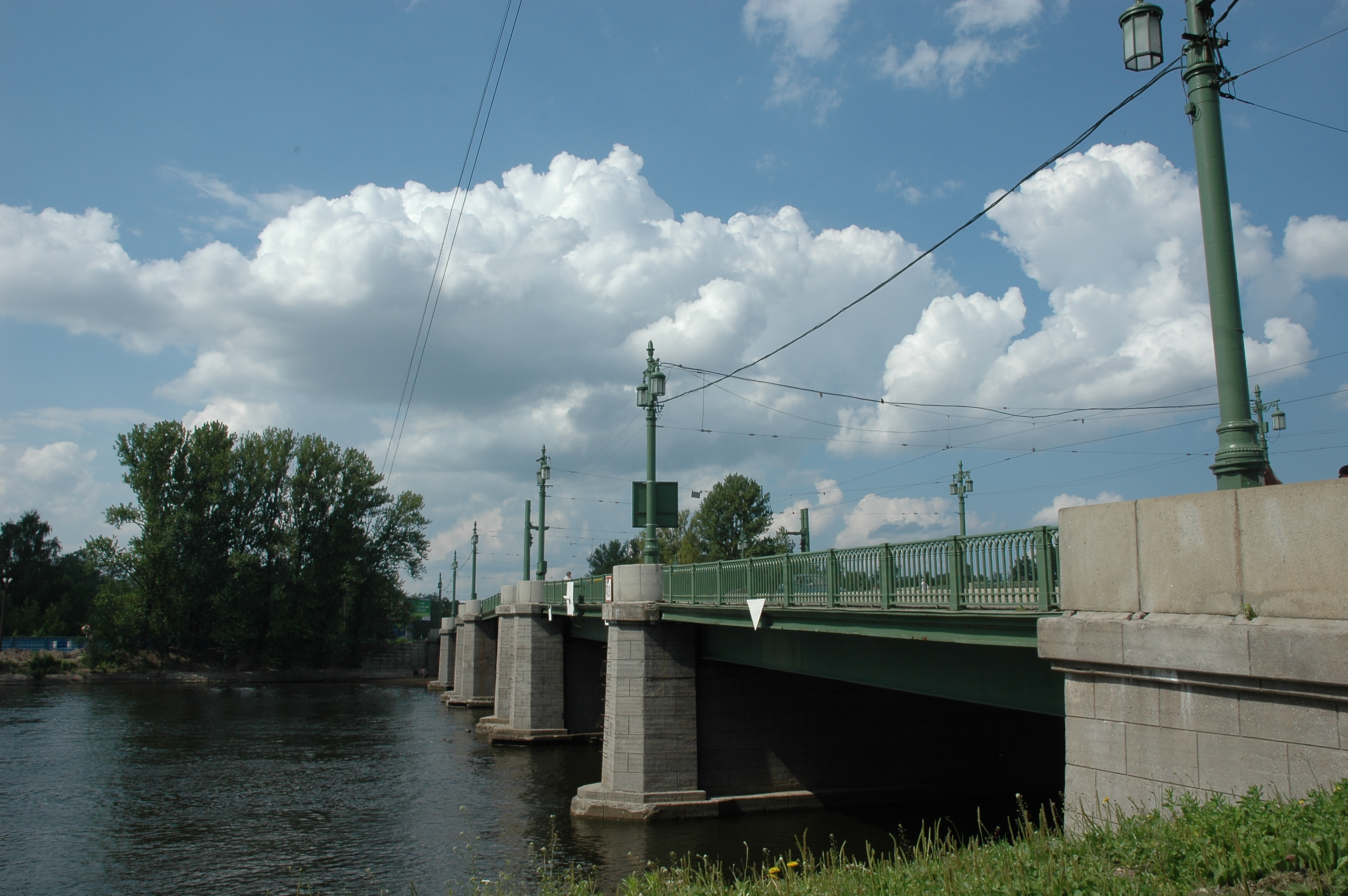 Bolshoi Krestovskii bridge across Malaia Nevka in St Petersburg